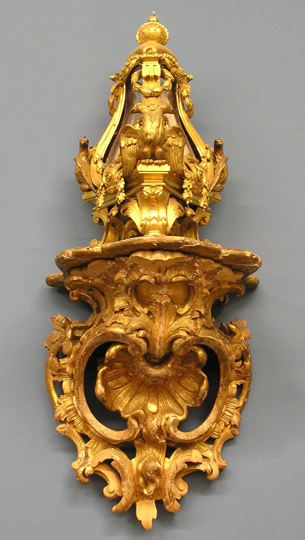 Санкт-Петербург. Петропавловская крепость. Комендантский дом. Государственный музей истории Санкт-Петербурга. "Петербург - Петроград. 1703-1918 гг." Зерцало